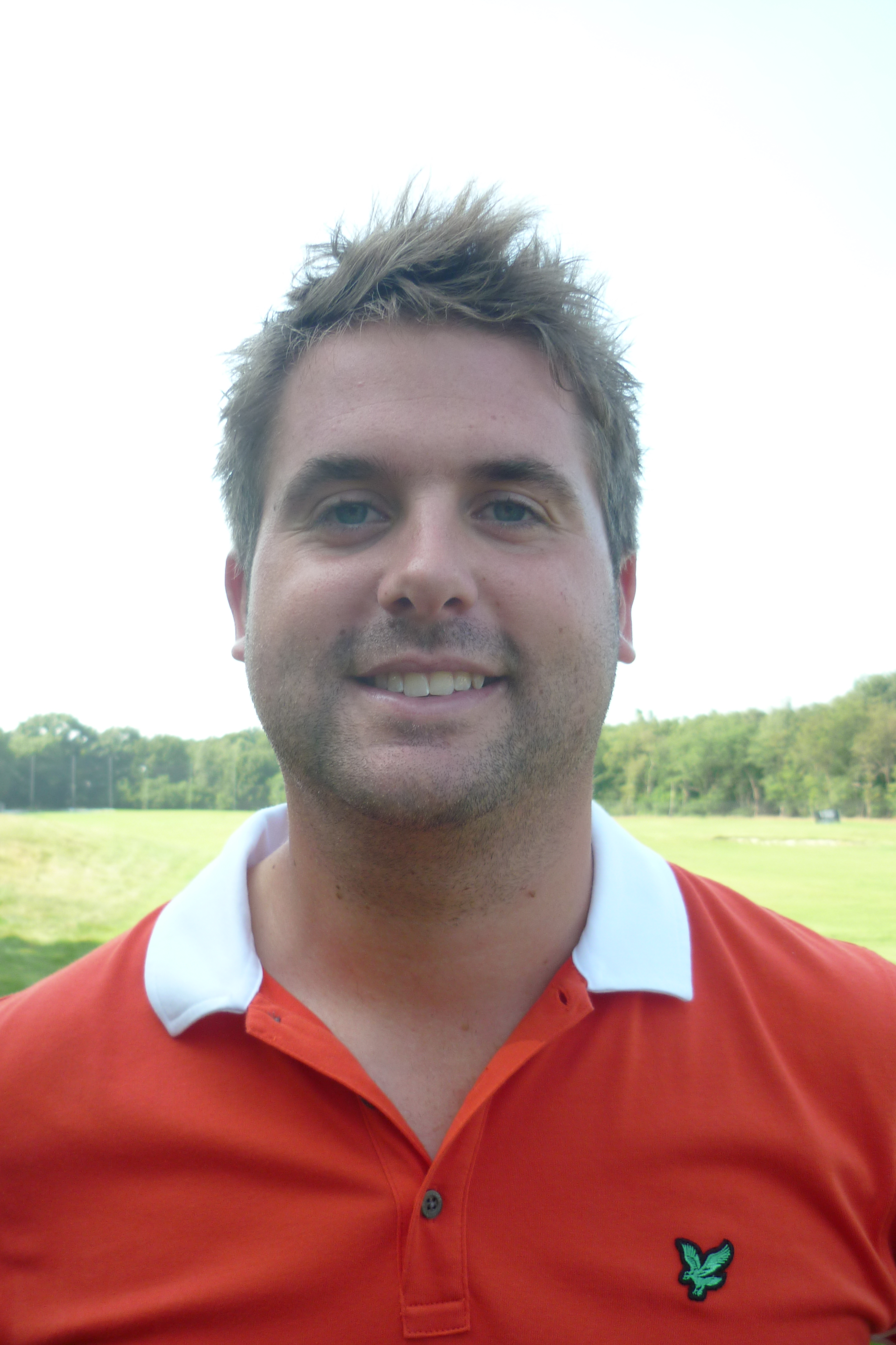 Matthew Baldwin